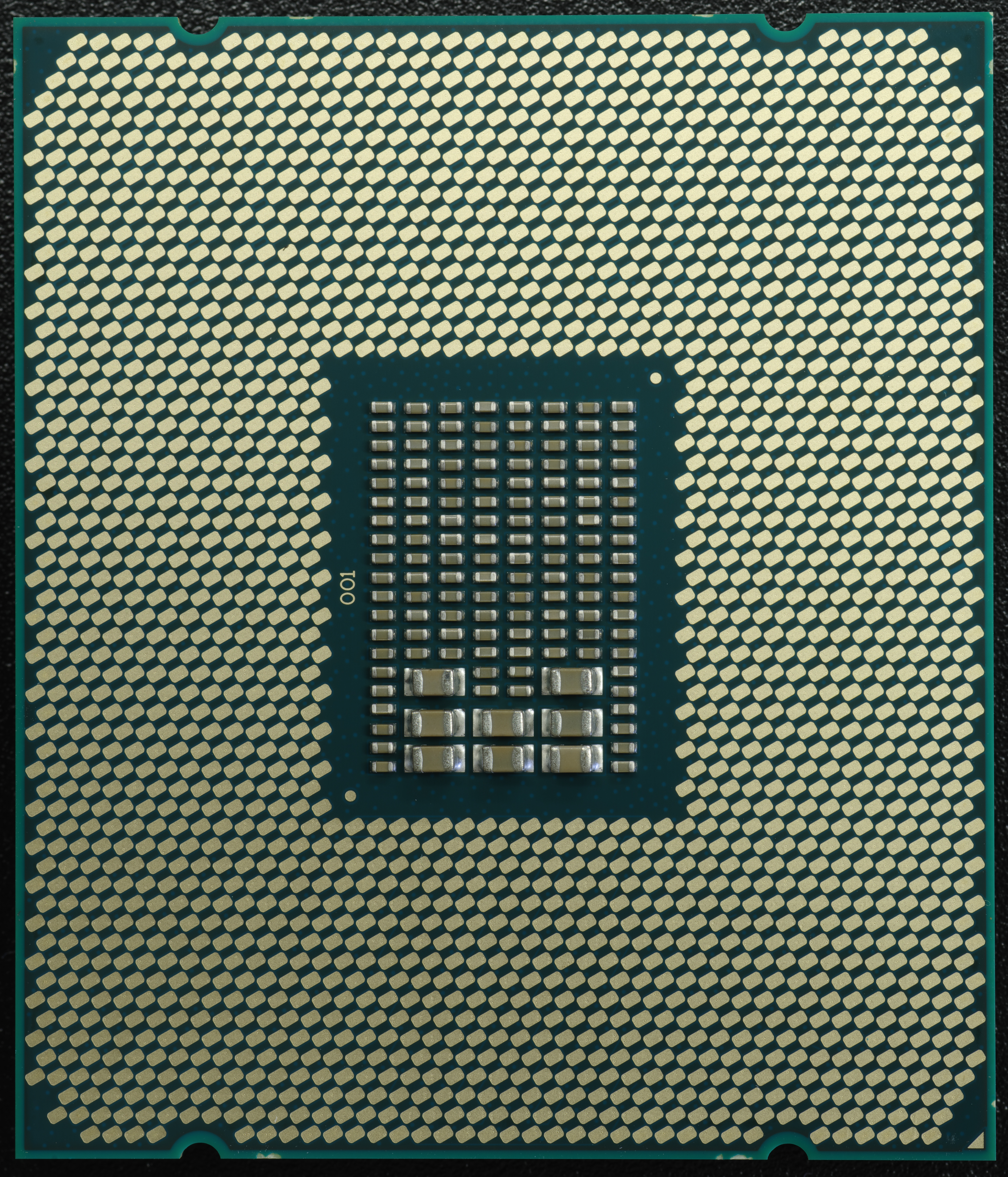 intel xeon E5-1650V4 Unterseite